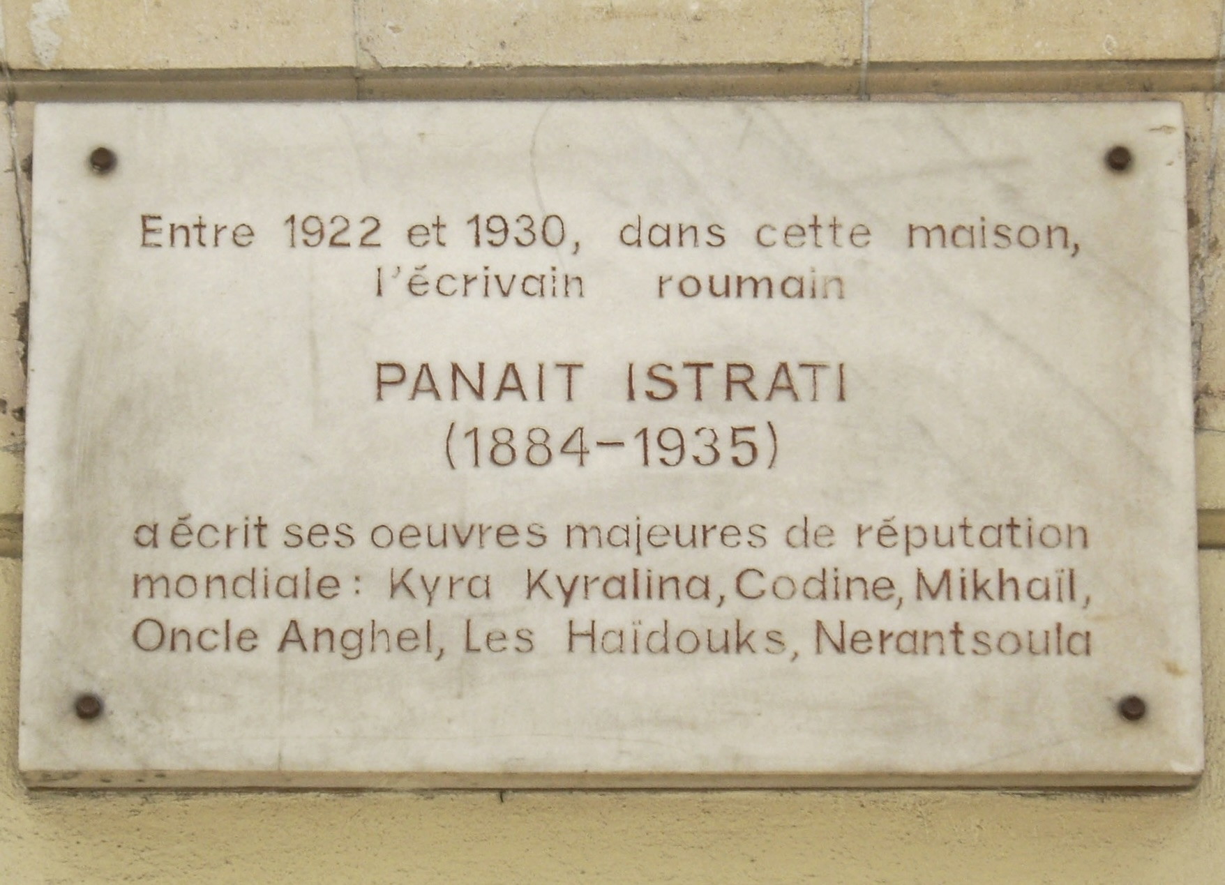 Plaque commémorative, 24 rue du Colisée, Paris 8e.« Entre 1922 et 1930, dans cette maison, l'écrivain roumain Panait Istrati (1884-1935) a écrit ses œuvres majeures de réputation mondiale : Kyra Kyralina, Codine, Mikhail, Oncle Anghel, Les Haïdouks, Nerantsoula. »